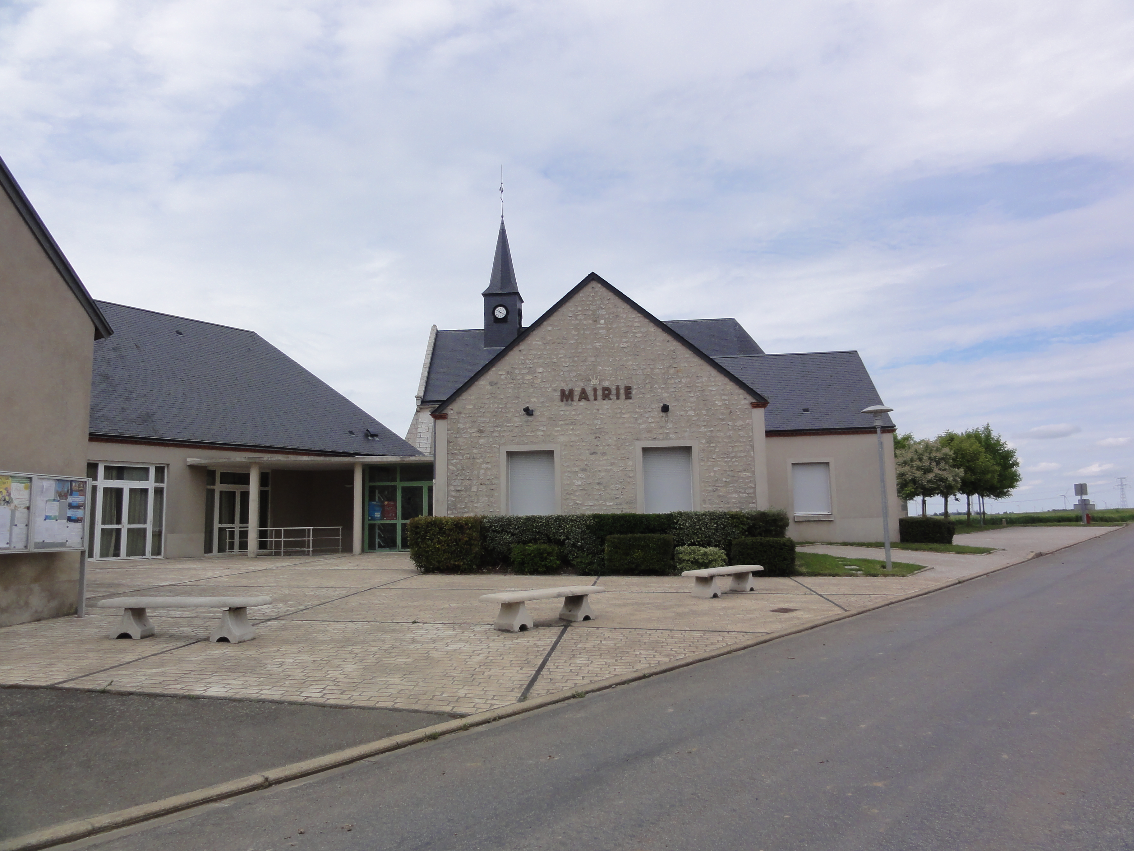 Dambron (Eure-et-Loir) Mairie